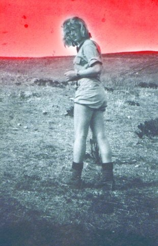 נתיבה בן יהודה בפלמח. עיבוד לתצלום סטודיו בוילר